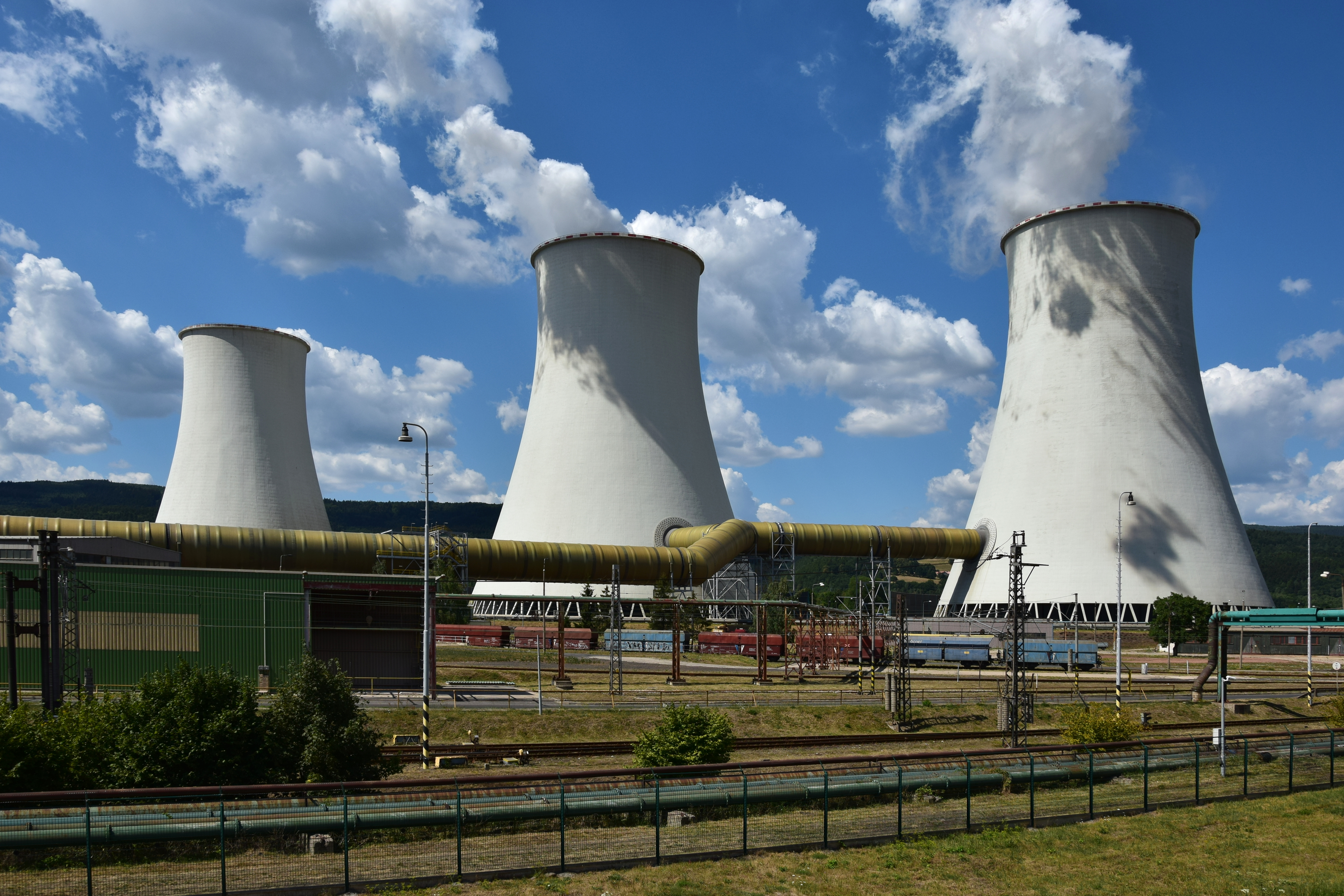 Elektrárna Prunéřov – chladící věže